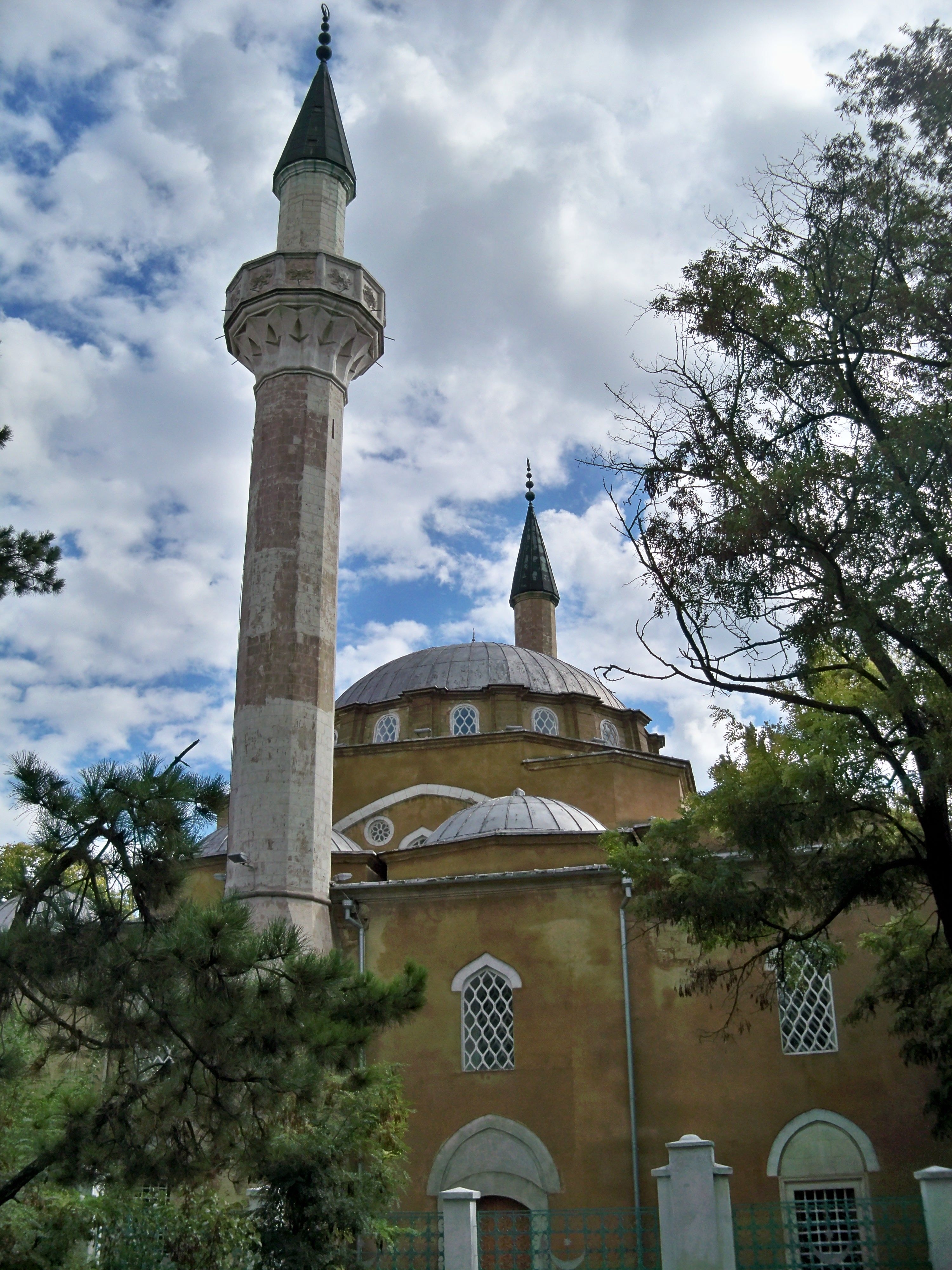 Мечеть Джума-Джамі, Євпаторія, вул. Революції, 36/1/3, літ. В